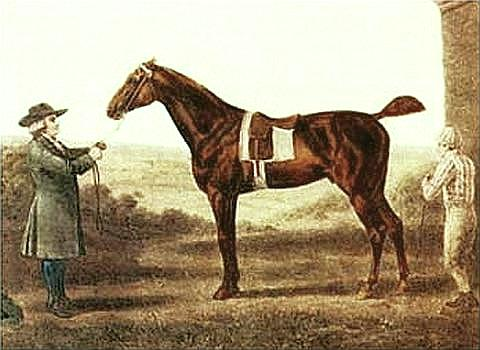 Diomed (first winner of the Epsom Derby - 1780)